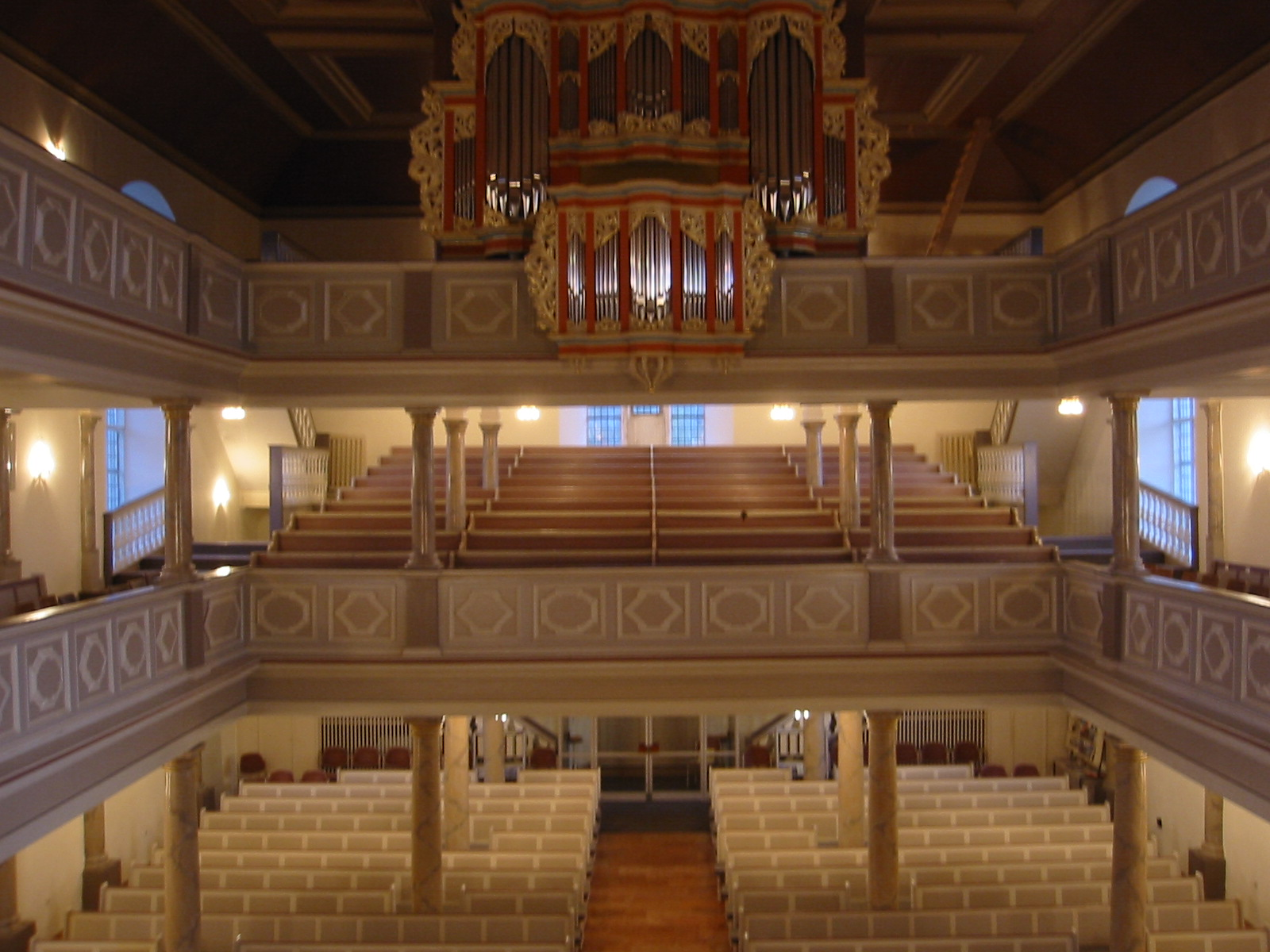 St. Andreaskirche innen